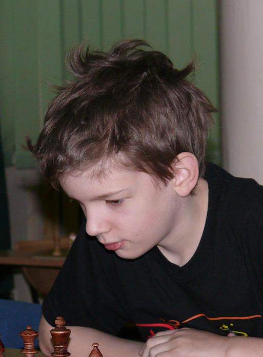 Jan-Krzysztof Duda Poland, Cracow 2009